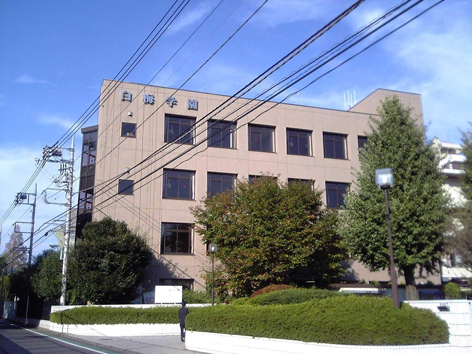 白梅学園大学・短期大学（東京都小平市）